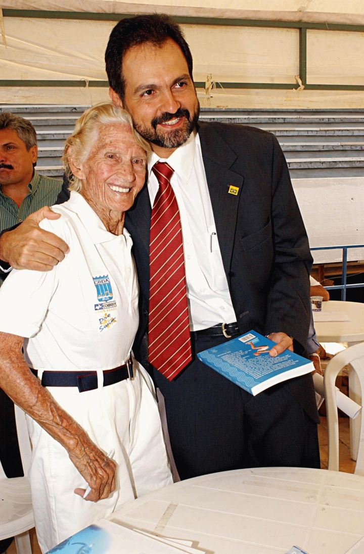 A ex-nadadora brasileira Maria Lenk com o ministro do Esporte Agnelo Queirós.